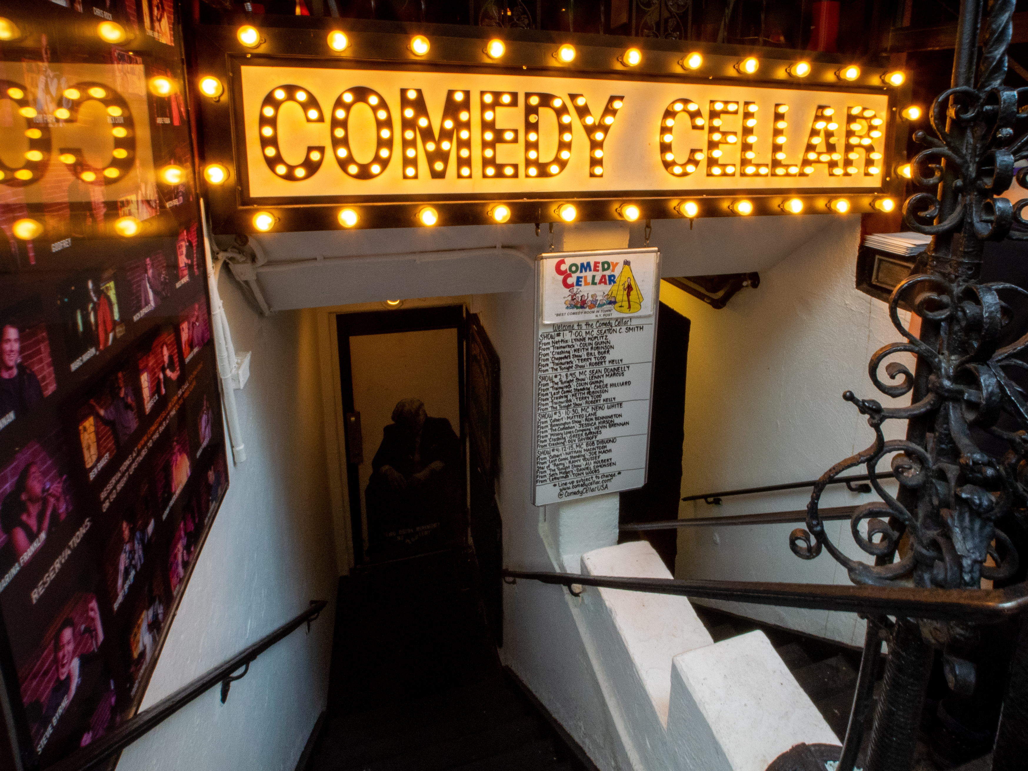 Greenwich Village, NYC